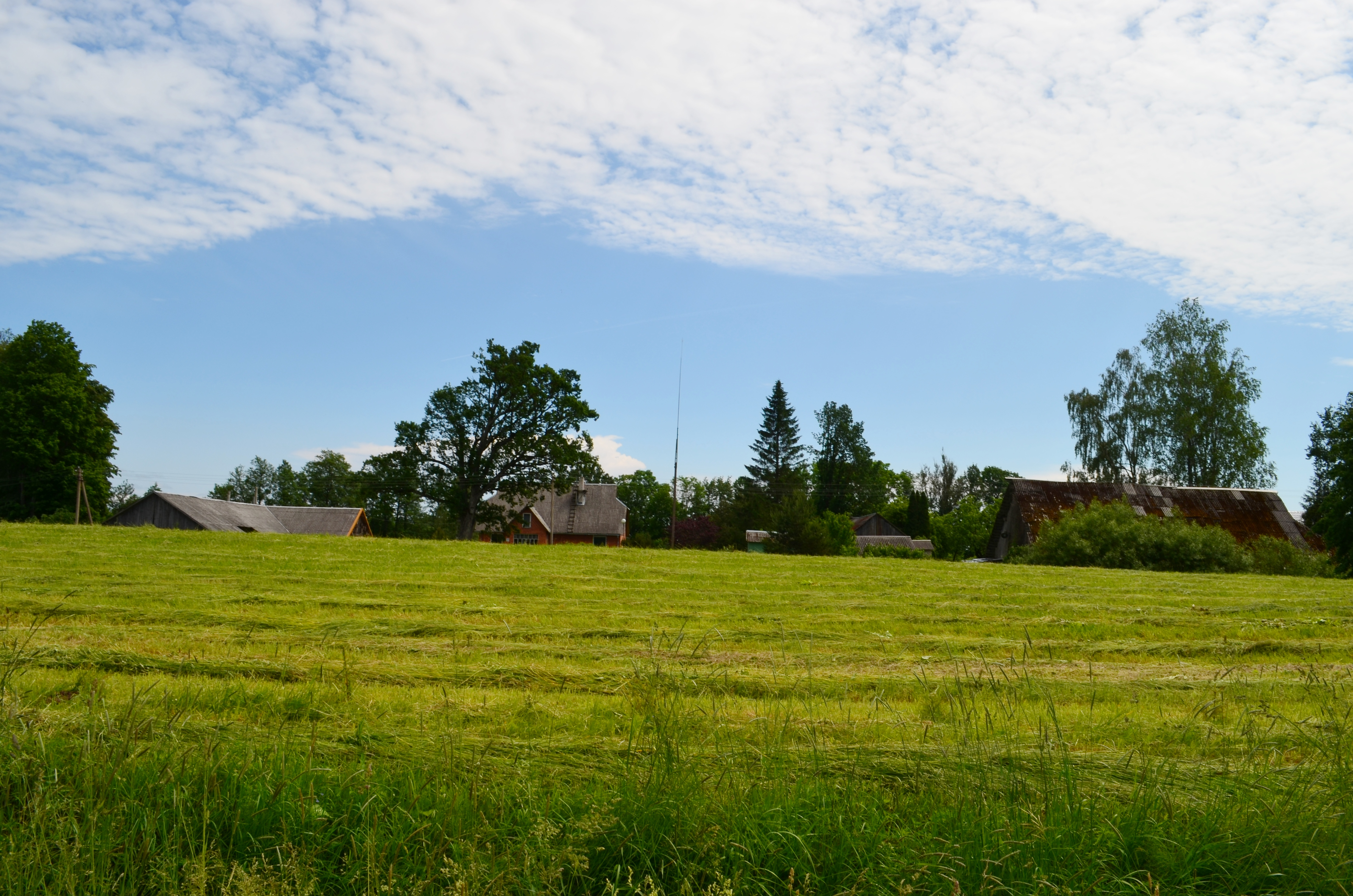 Bikėnai, Ignalinos r.